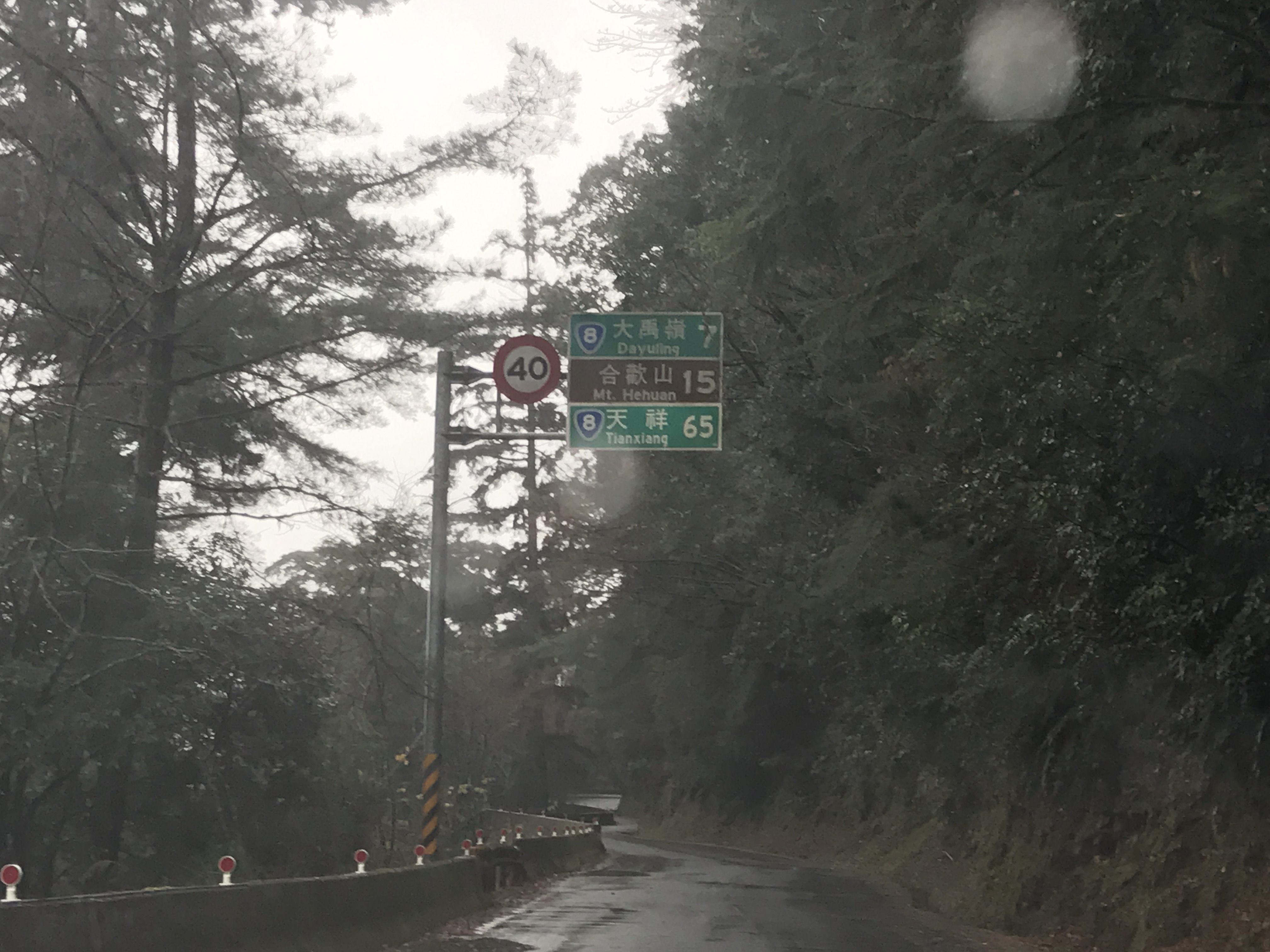 中文（台灣）: 台8線 松泉崗路段